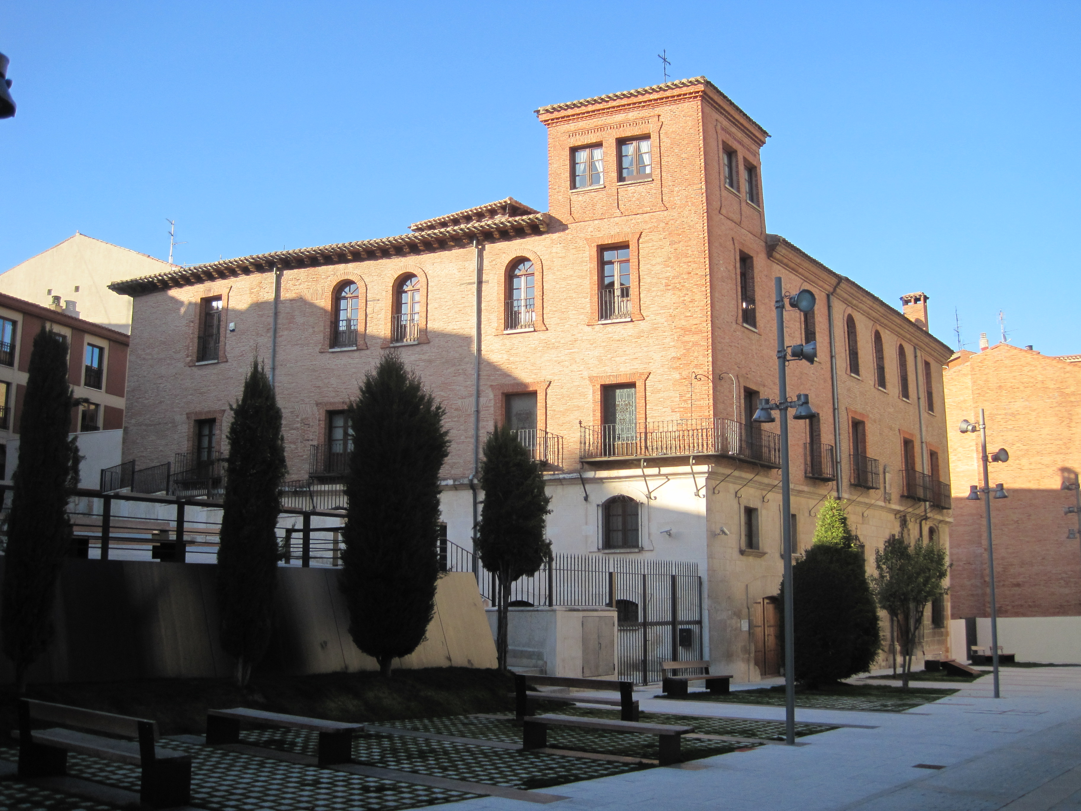 Vista externa del Palacio.